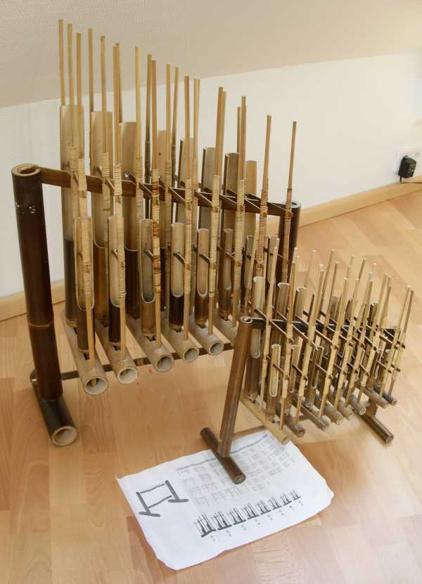 Die goßen Angklung sind die Noten C bis C', vorne die kleinen C' bis C", jeweils von links nach rechts, für den Größenvergleich ist ein Din-A4-Blatt auf dem Bild.